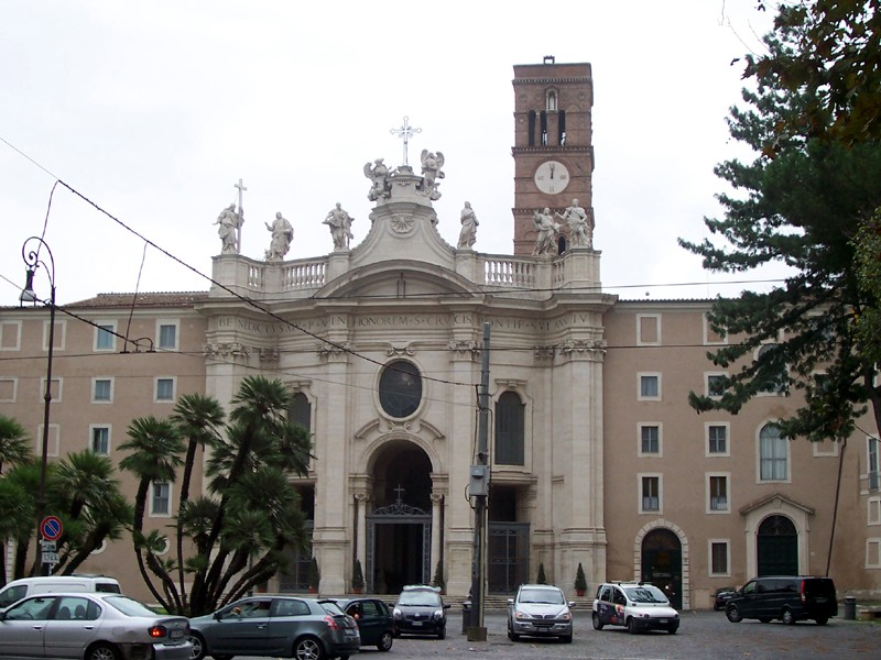 Roma - Basilica di S. Croce in Gerusalemme